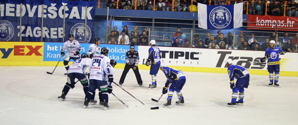 Hokej